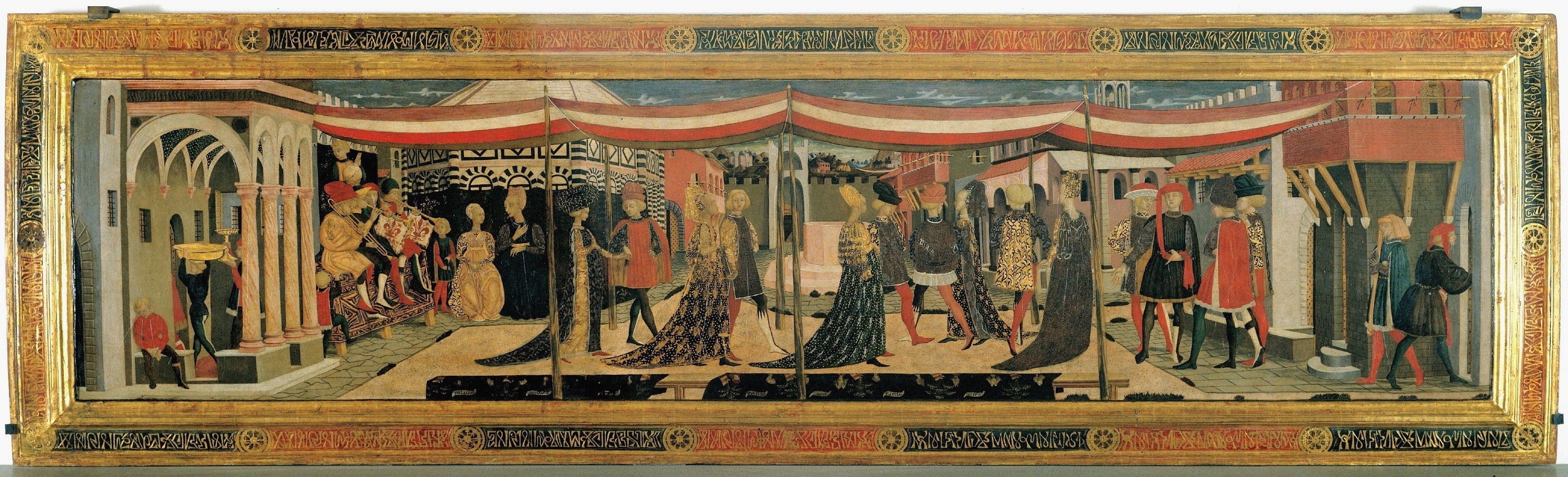 Le triomphe de l'Amour. Laure et Pétrarque y sont représentés, le poète carressant de sa main droite la joue de sa muse